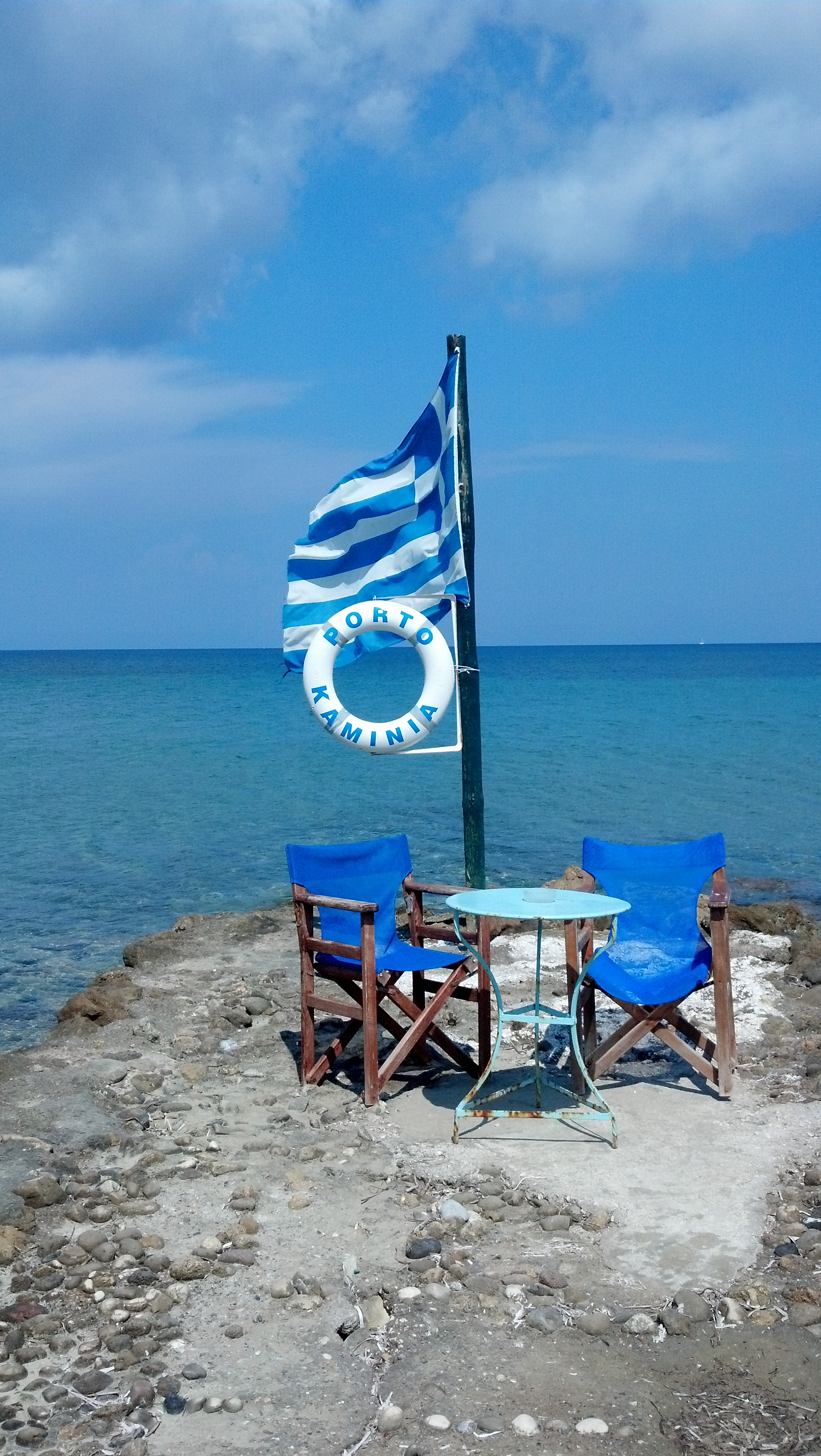 חוף הים באי זקינטוס, יוון